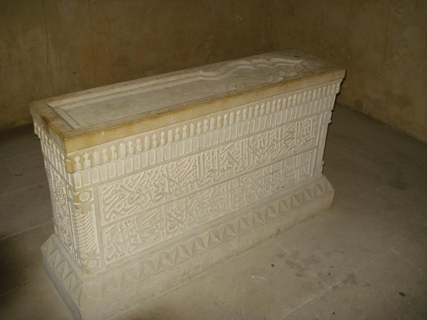 Надгробный камень Сейида Йахья Бакуви